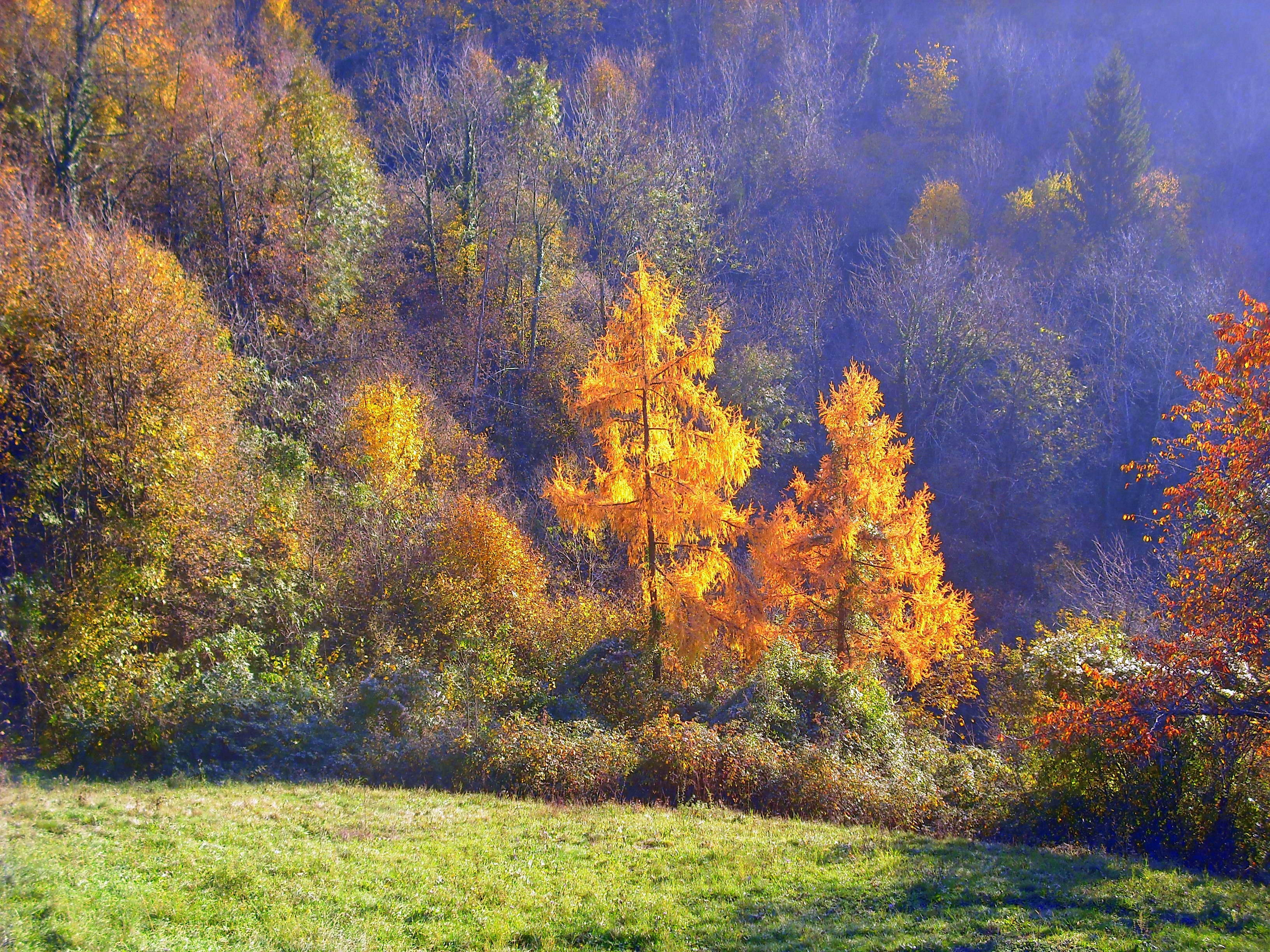 autunno a Cornalba(BG) Italy